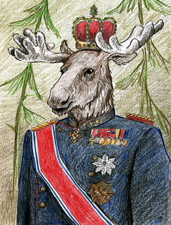 Skogens konge er en metafor for elg.